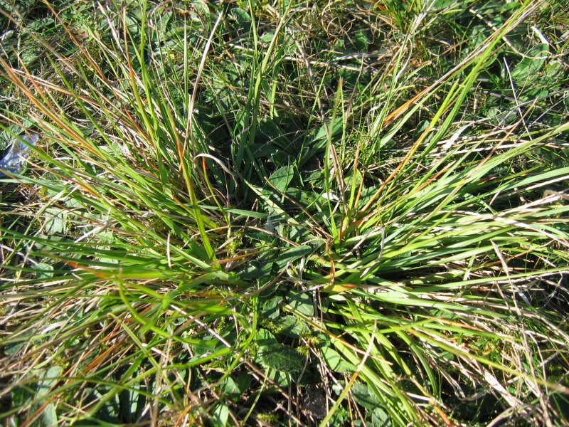 Dreizahn (Danthonia decumbens), Horst